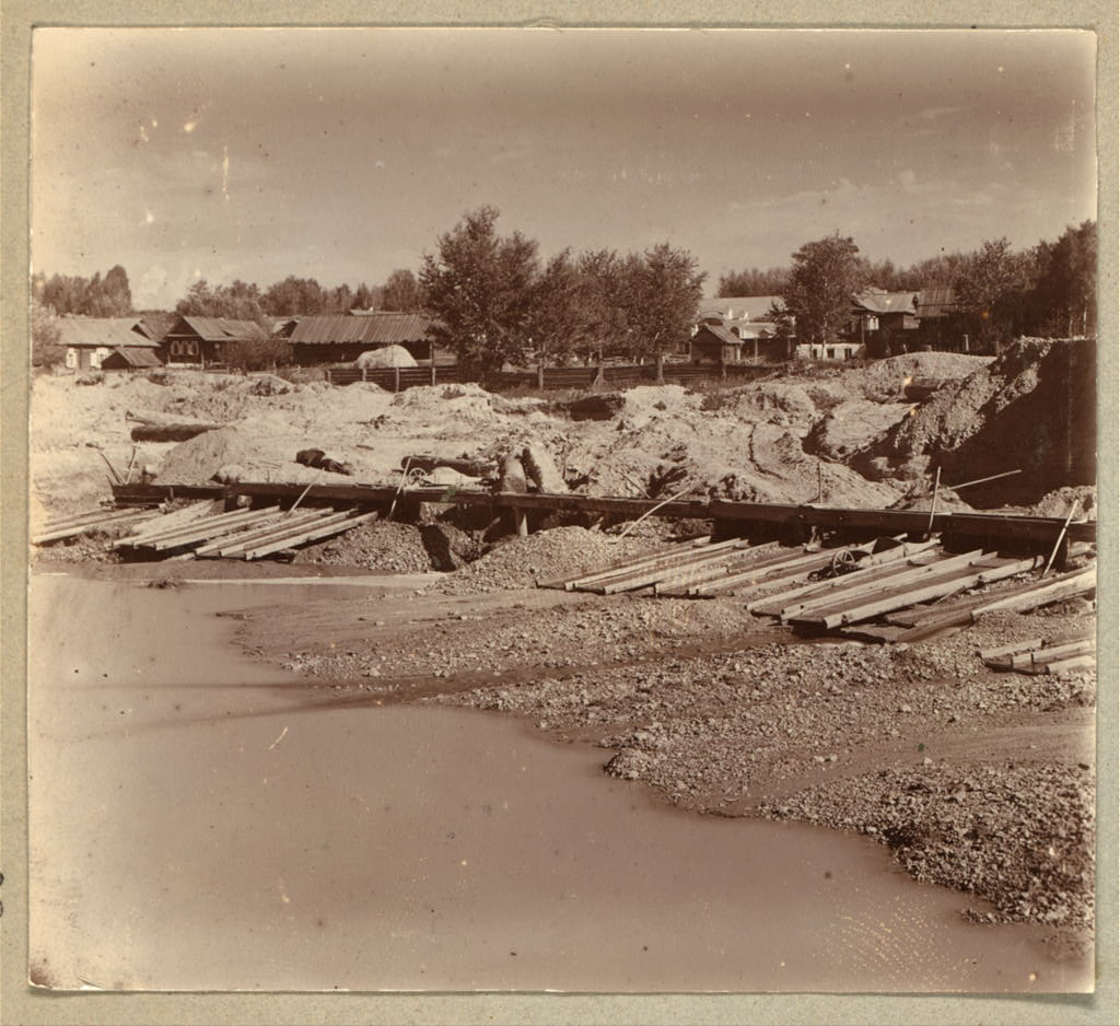 TITLE: Staratel'skīia raboty na r. Berezovkie. [Berezovski] TITLE TRANSLATION: Gold-mining works on the Berezovka River. [Berezovski]